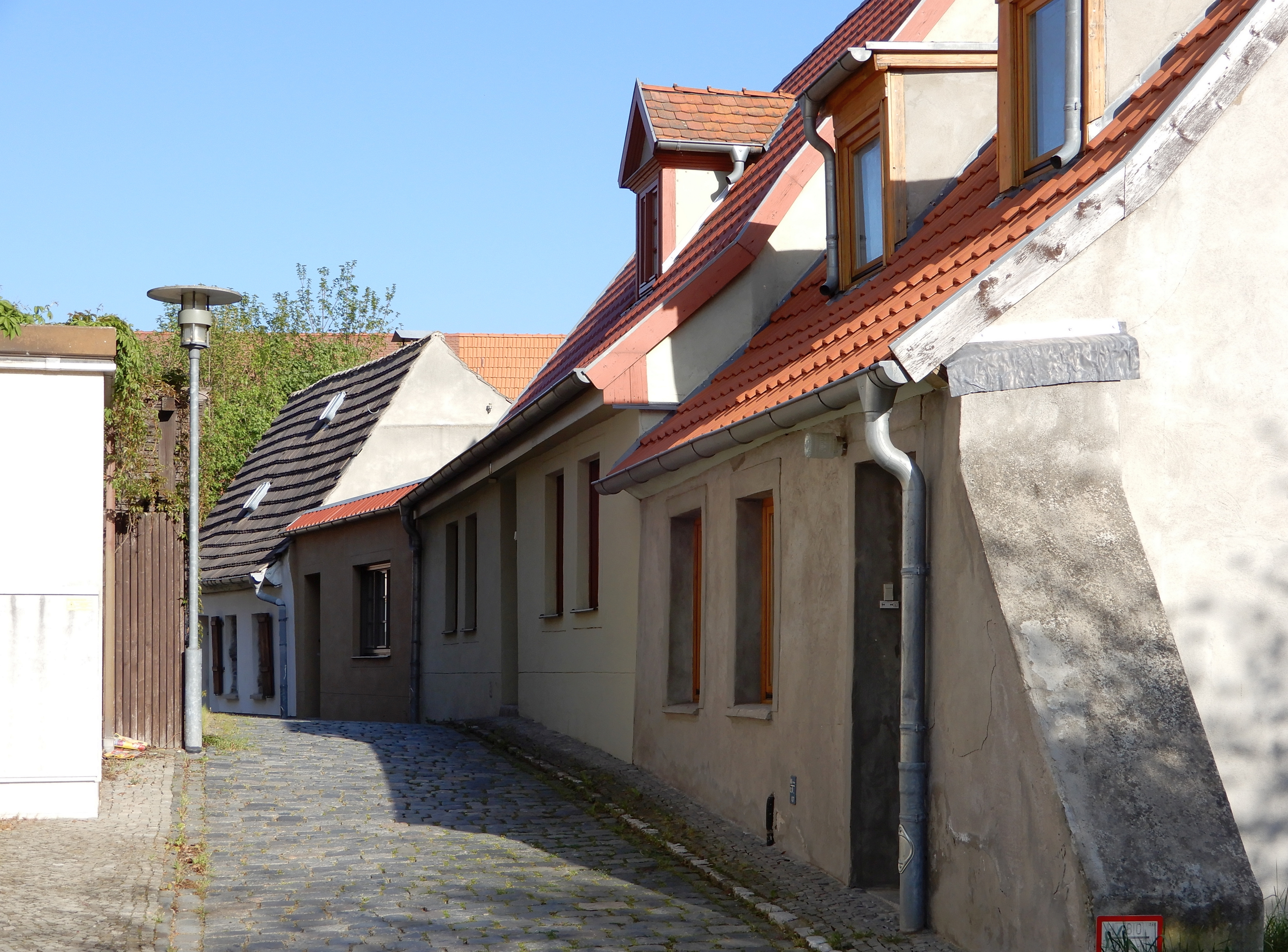 Gebäude Margarethenkirchhof 7-9 in Aschersleben